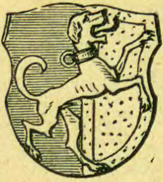 Historical coat of arms of the city of Michelau, now Michałów (Gmina Olszanka, within Brzeg County, Opole Voivodeship)